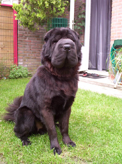 Shar-Pei